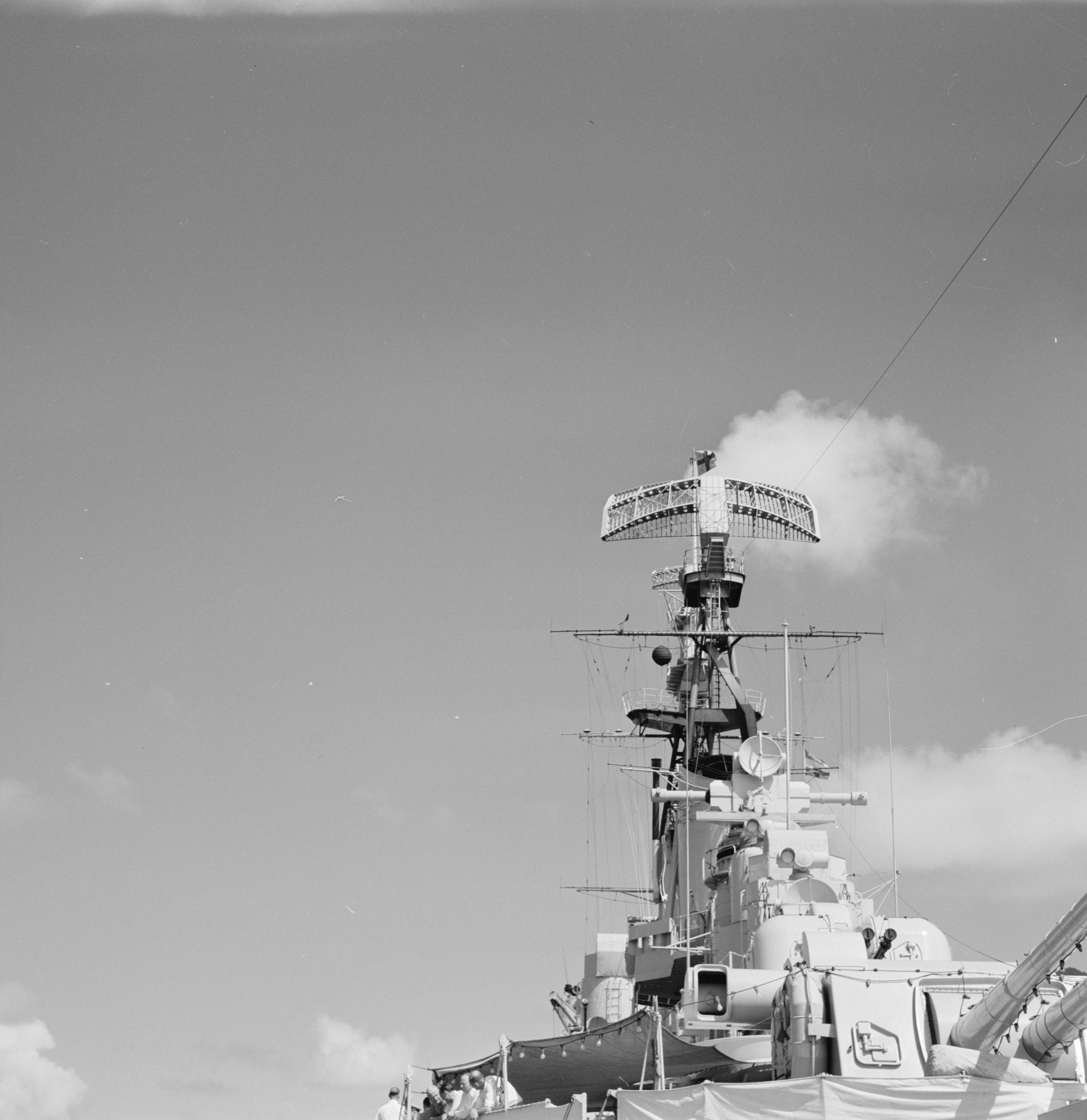 Collectie / Archief : Fotocollectie Van de Poll Reportage / Serie : Nederlandse Antillen en Suriname ten tijde van het koninklijk bezoek van koningin Juliana en prins Bernhard in 1955 Beschrijving : H.M. kruiser De Ruyter in Willemstad Datum : oktober 1955 Locatie : Aruba, Nederlandse Antillen, Willemstad Trefwoorden : schepen Fotograaf : Poll, Willem van de Auteursrechthebbende : Nationaal Archief Materiaalsoort : Negatief (zwart/wit) Nummer archiefinventaris : bekijk toegang 2.24.14.02 Bestanddeelnummer : 252-4042